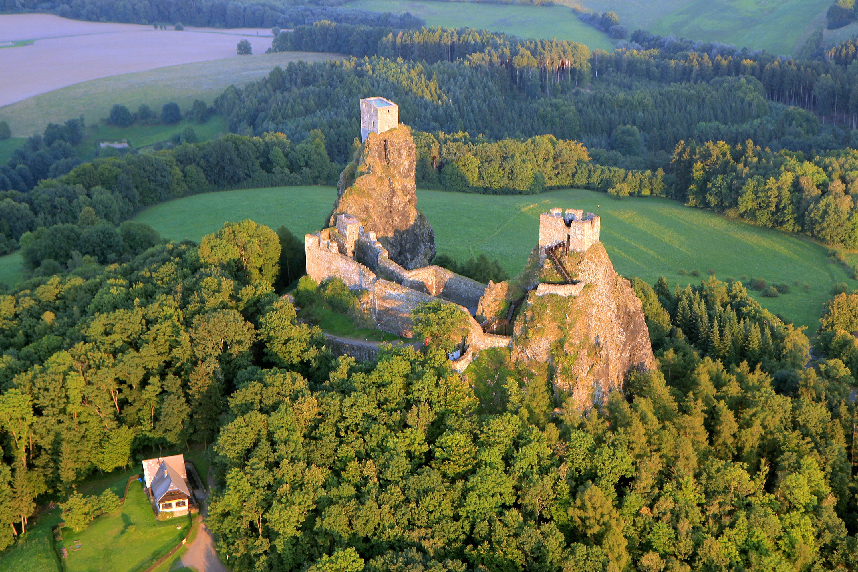 Hrad Trosky, zřícenina (Troskovice), Troskovice